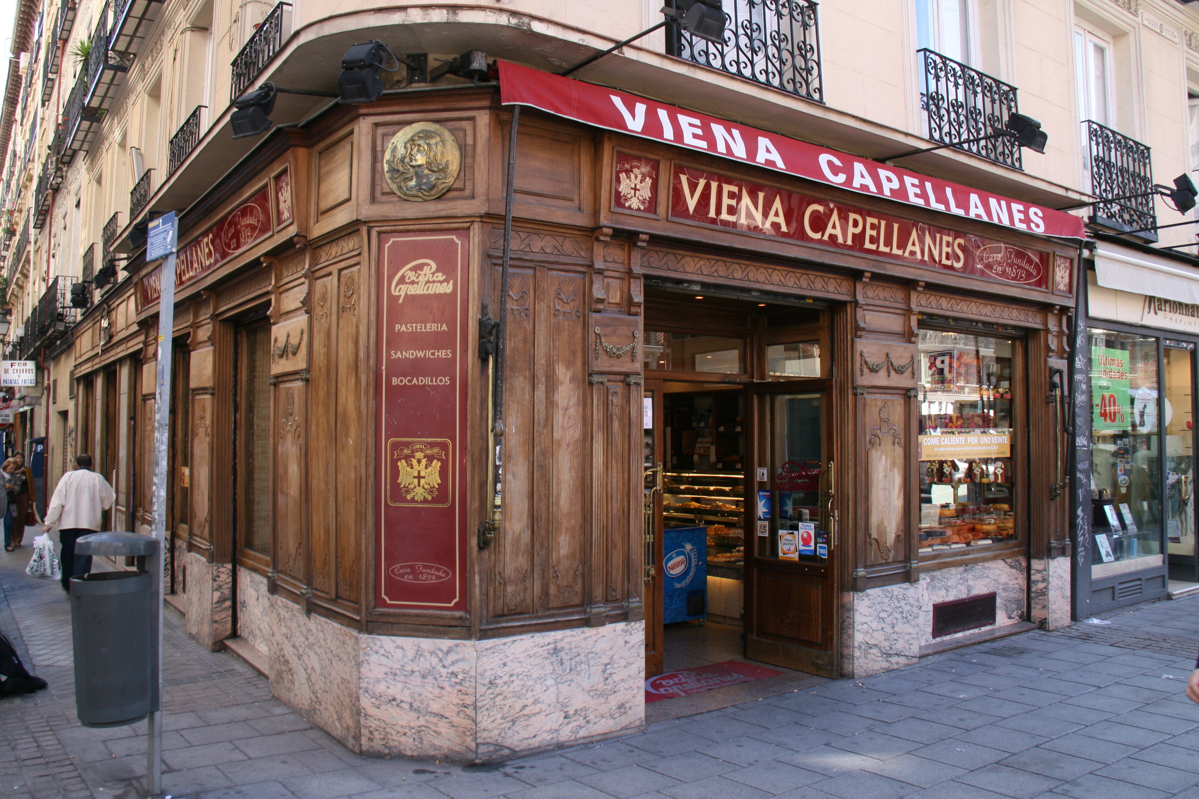 Viena Capellanes (Fuencarral 122) - Madrid